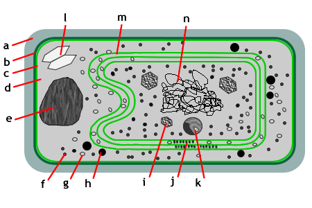 Estructura cellular dels cianobacteris Català a. Membrana exterior b. Capa de peptidoglicà c. Membrana plasmàtica d. Citoplasma e. Grànul de cianoficina f. Ribosoma g. Grànul de glicogen h. Cos lipídic i. Carboxisoma j. Ficobilisoma k. Grànul de polifosfat l. Vacúol gasífer m. Tilacoide n. Nucleoplasma Estructura celular de las cianobacterias Español a. Membrana celular b. Capa de peptidoglucanos c. Membrana plasmàtica d. Citoplasma e. Gránulo de cianoficina f. Ribosoma g. Gránulo de glicógeno h. Cuerpos lipídicos i. Carboxisoma j. Ficobilisoma k. Gránulo de polifosfat l. Vacuola gasífera m. Tilacoide n. Nucleoplasma